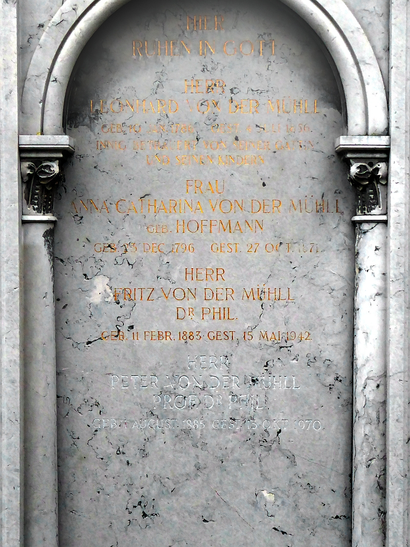 Peter von der Mühll (1885–1970) Dr.phil., Professor, Philologe, o. Prof. für griech. Literatur und Sprache an der Univ. Basel, Autor, Mitglied versch. Akademien, Dr. h.c. der Univ. Saloniki und Athen Grab auf dem Friedhof Wolfgottesacker, Basel